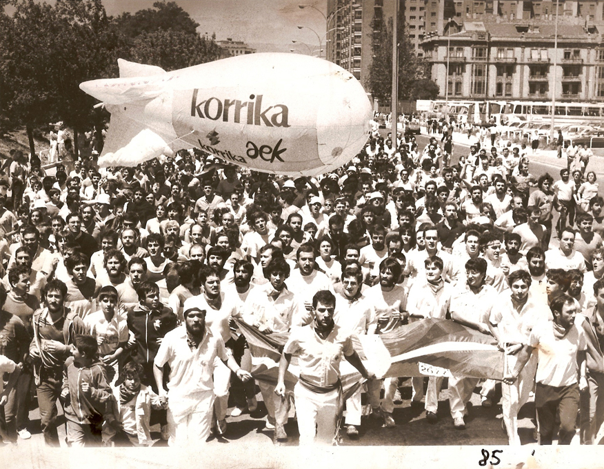 Korrika 4 Iruña zeharkatzen = Fotografía de la 4a edición de la Korrika del año 1985 a su paso por la Avenida del Ejército de Pamplona Colección AMARAuna Bilduma 1985 Er. 140 Iturria / Fuente: Mertxe Mardaras Informazio gehiago / Más información: Amarako Ernest Lluch Kultur Etxeko Liburutegia / Biblioteca del Centro Cultural Ernest Lluch de Amara (Donostia-San Sebastián). Korrika, popular relay race in support of the Basque language across Donostia-San Sebastián